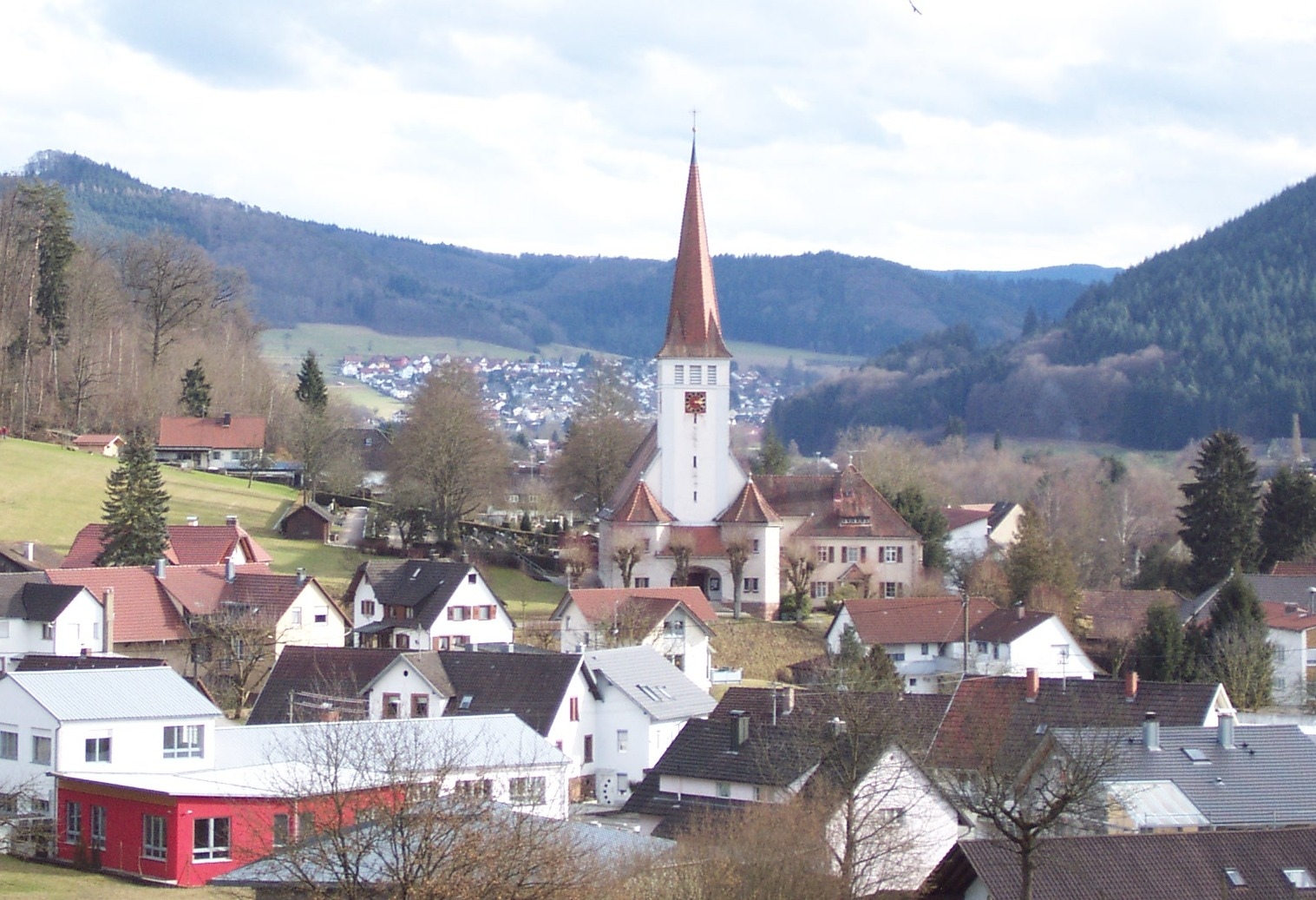 Ansicht des Lahrer Stadtteils Kuhbach mit Pfarrkirche "Mariä Heimsuchung", aufgenommen im Frühjahr 2010.